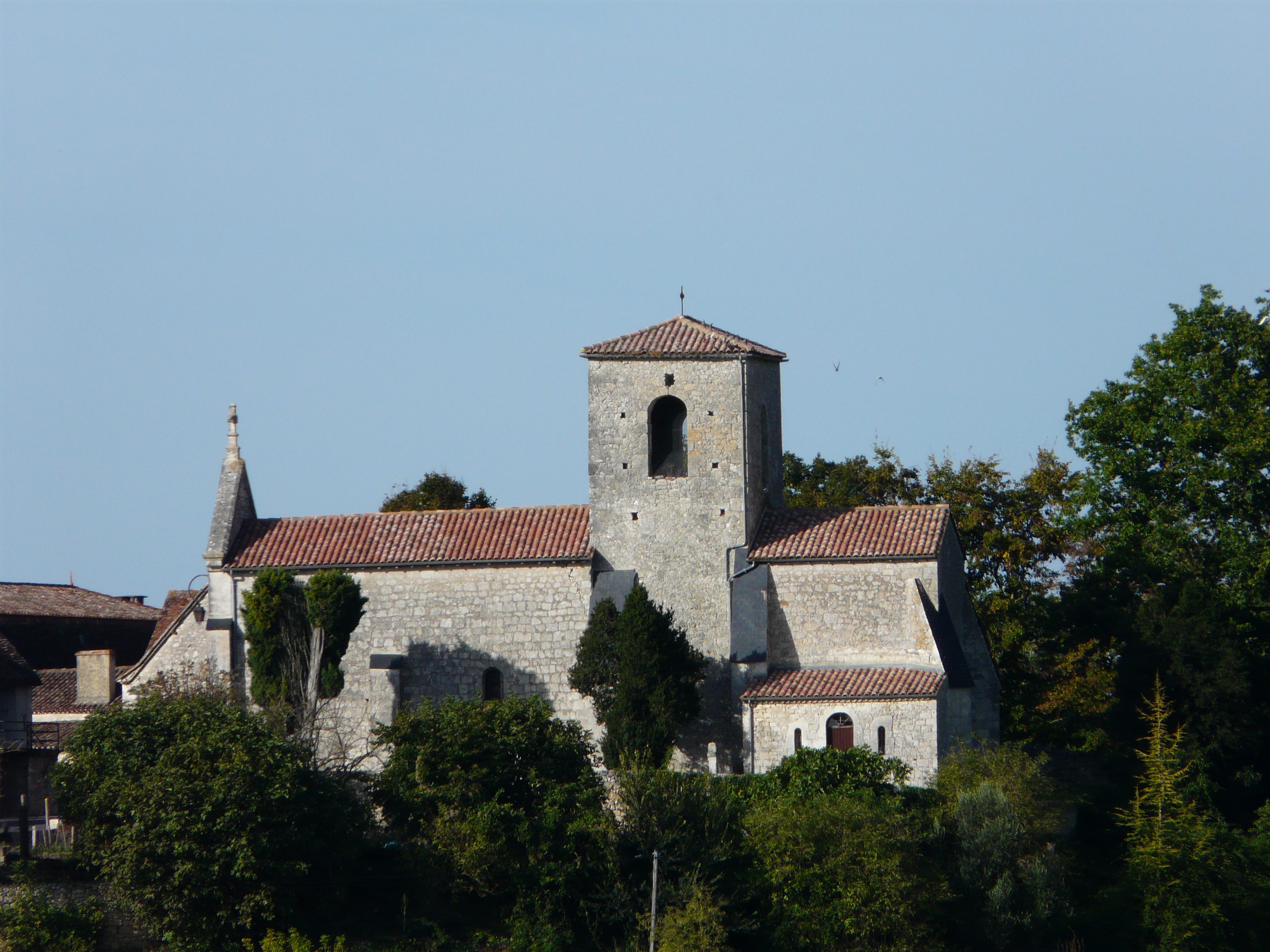 L'église Saint-Clair de Rouffignac-de-Sigoulès, Dordogne, France.